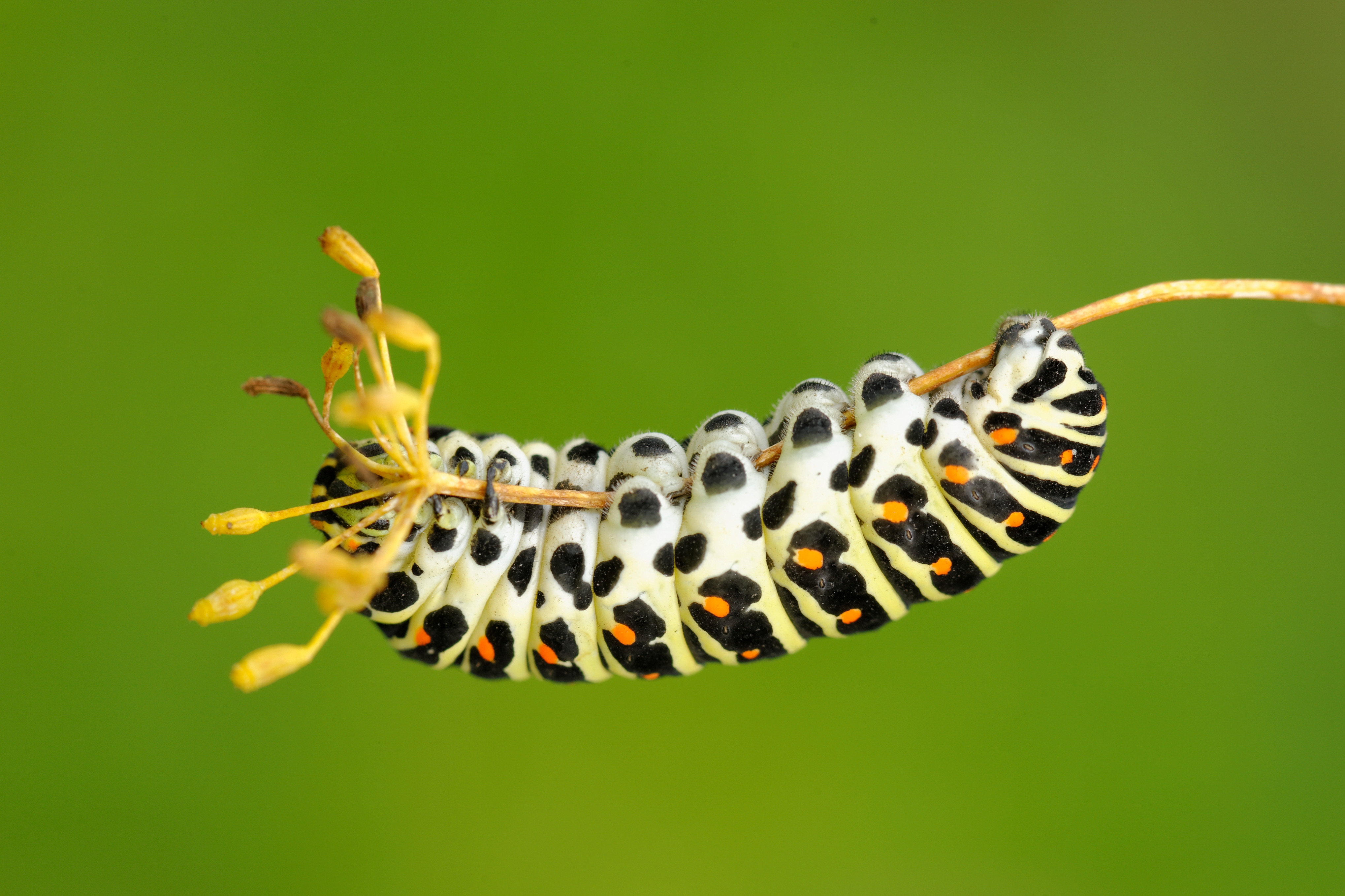 Pääsusaba (Papilio machaon) röövik septembris